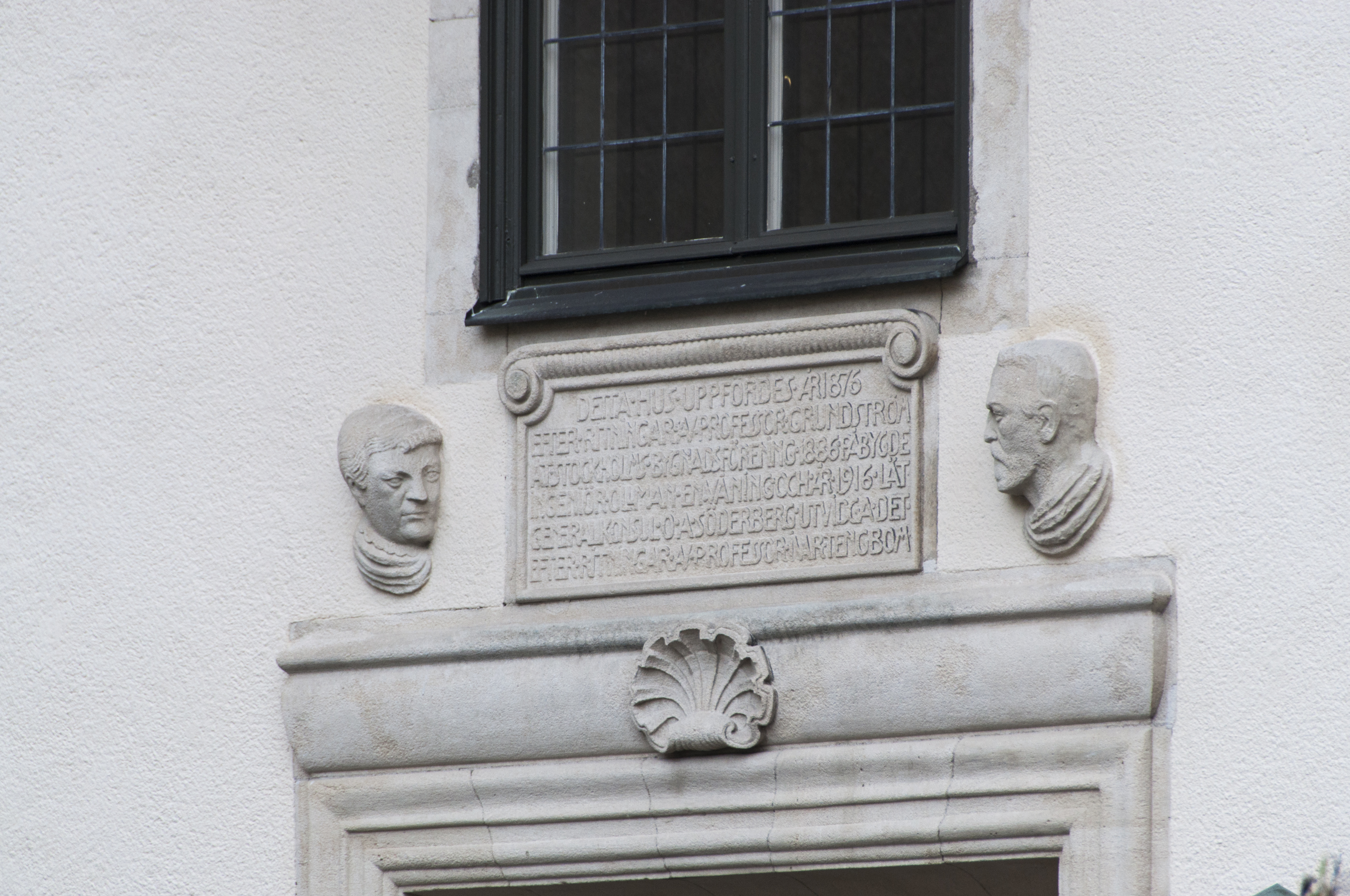 Detta hus uppfördes år 1876 efter ritningar av professor Grundström åt Stockholms Bygnadsförening. 1886 påbyggde ingenjör Ollman en våning och år 1916 lät generalkonsul O. A. Söderberg utvidga det efter ritningar av professor Ivar Tengbom. Olof A Söderberg och Otilia Herzog i relief